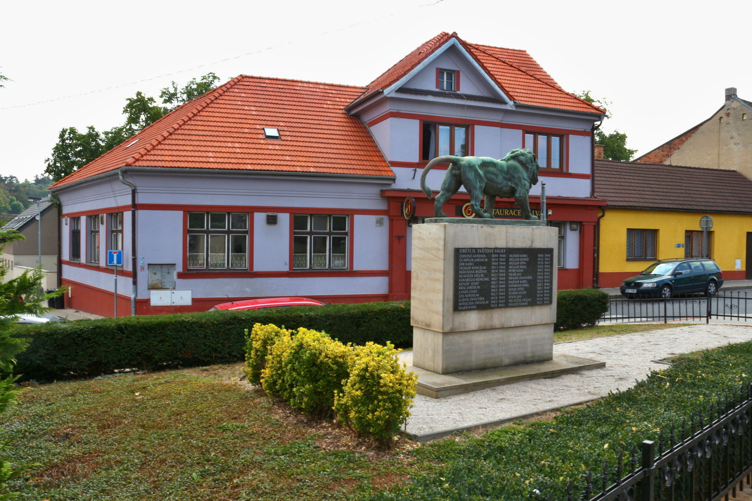 Náměstí U Lva